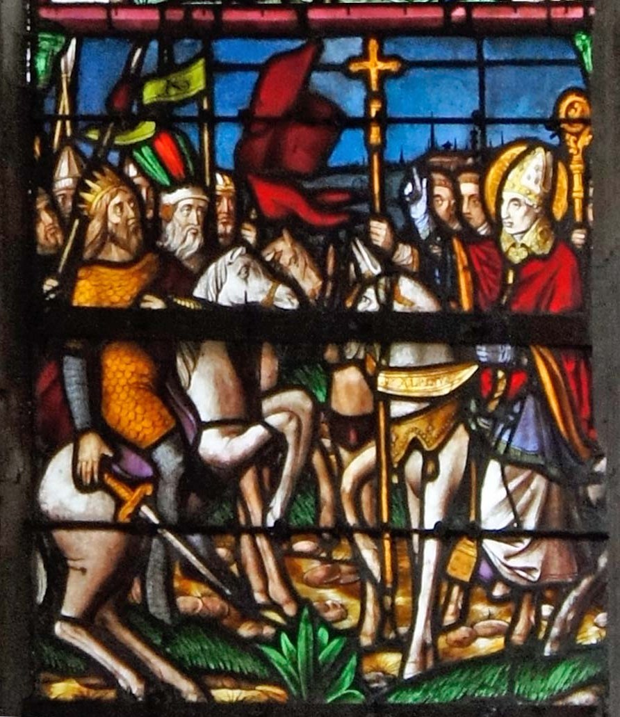 Alpin évêque de Chalons arrête Attila avant qu'il ne dévaste la ville. Vitrail de l'église saint-Alpin de Châlons.